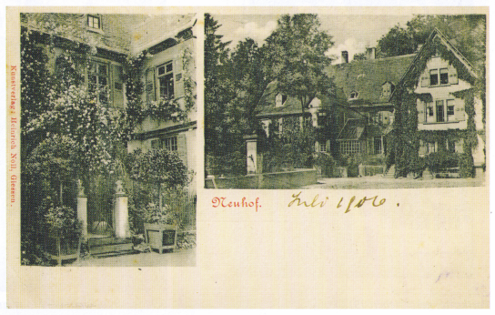 Postkarte des Neuhofs